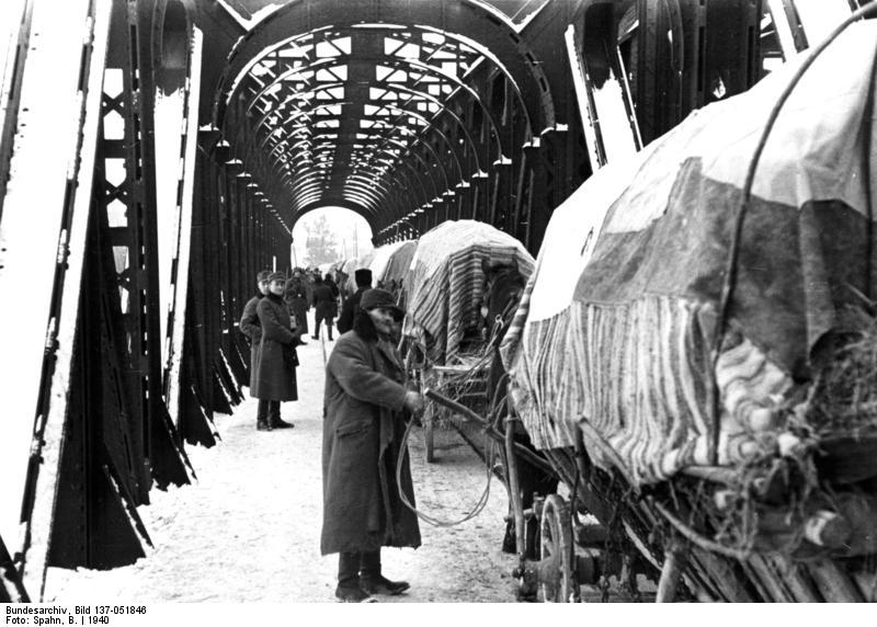 Polen, Umsiedler, Pferdewagentreck Przemysl Umsiedler aus Ostpolen: der letzte Treck passiert die Sanbrücke Quelle: Spahn 1940 [Przemysl.- Pferdewagentreck ostpolnischer Umsiedler auf einer Brücke über die San.]